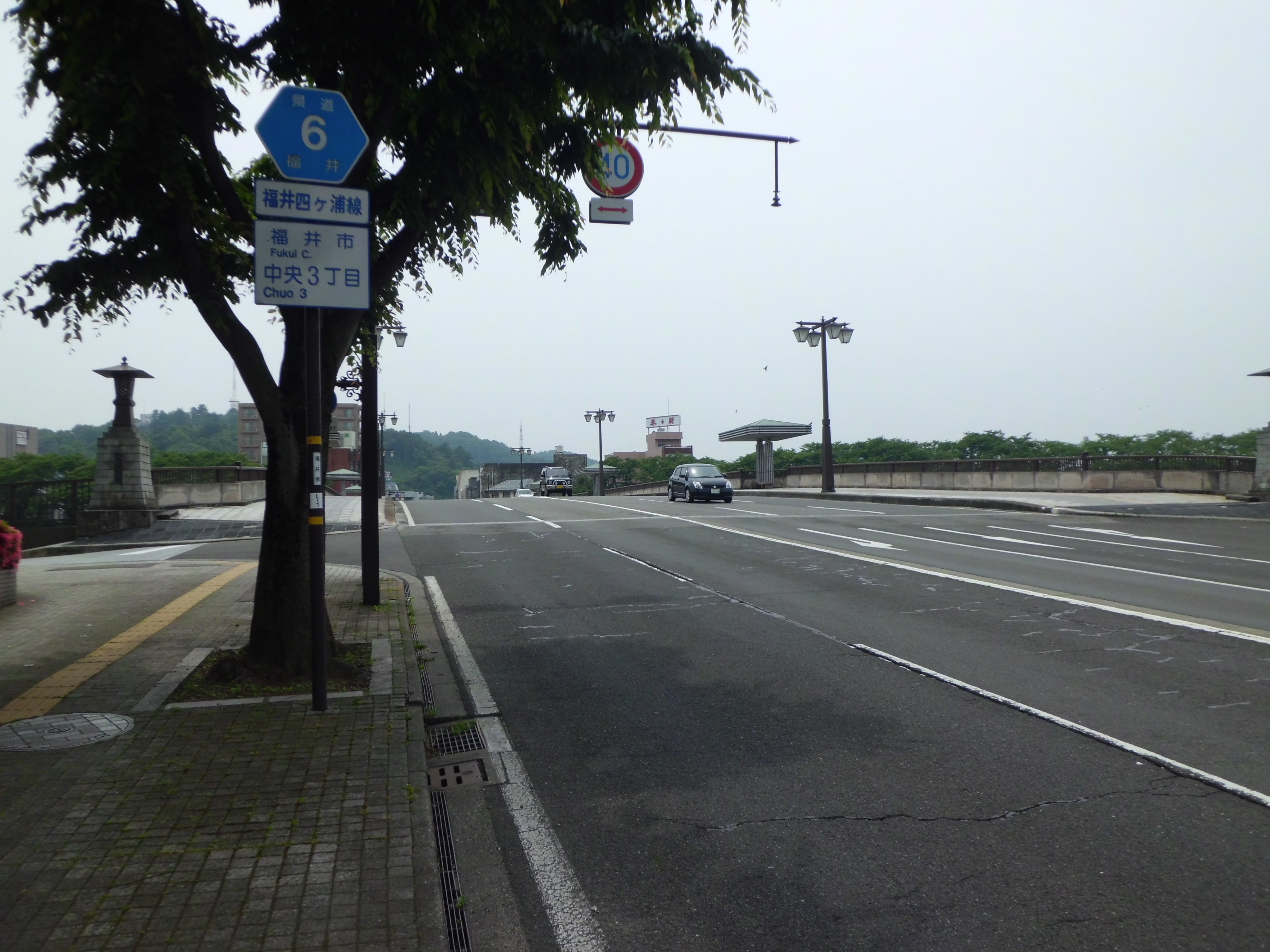 福井県道6号福井四ヶ浦線。福井市九十九橋北交差点より南を望む。